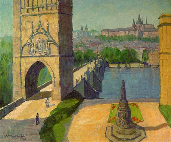 Prager Karlsbrücke mit Hradschin im Sonnenlicht